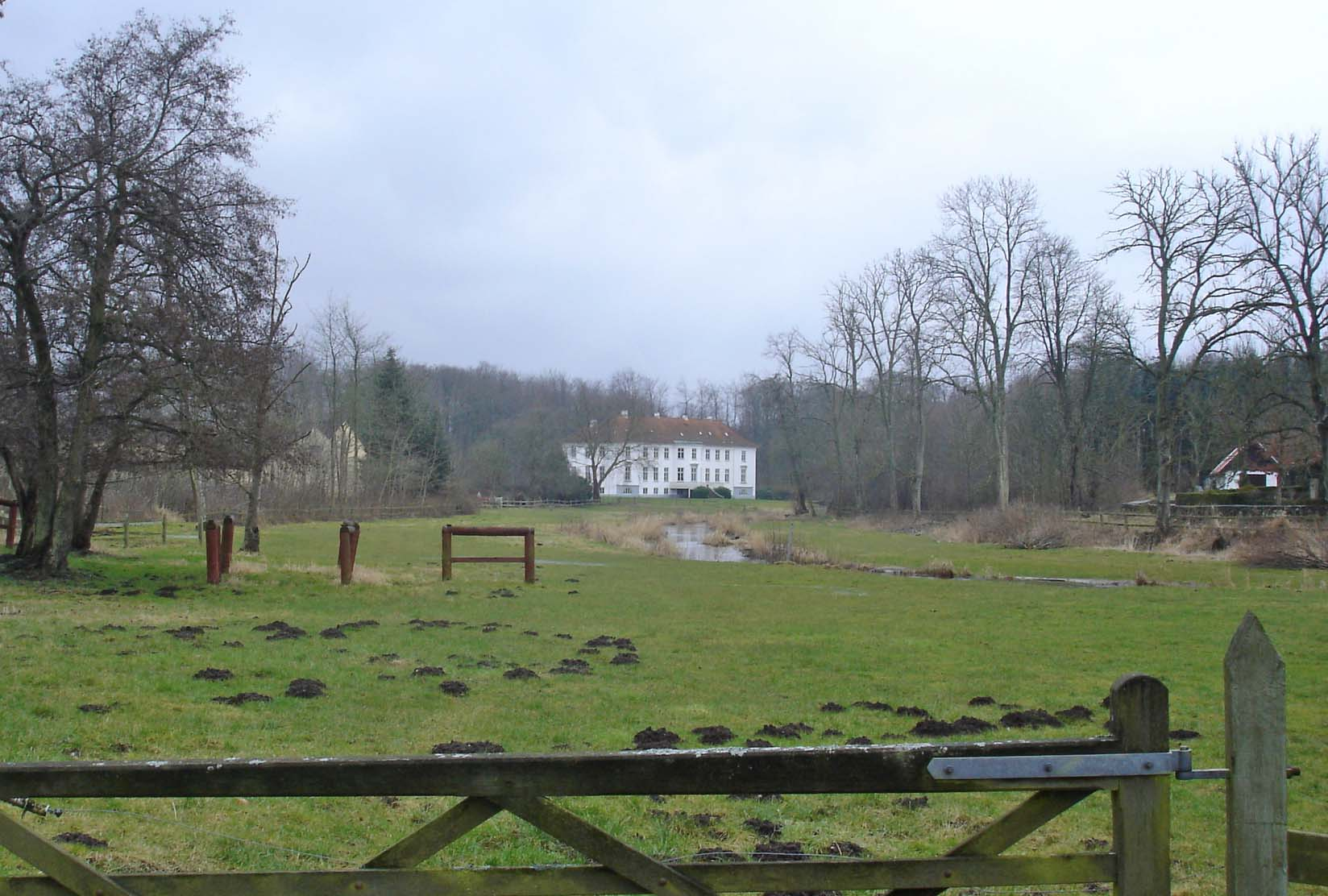 Kærsgaard i Brenderup fra nordøst med Stor Å i forgrunden